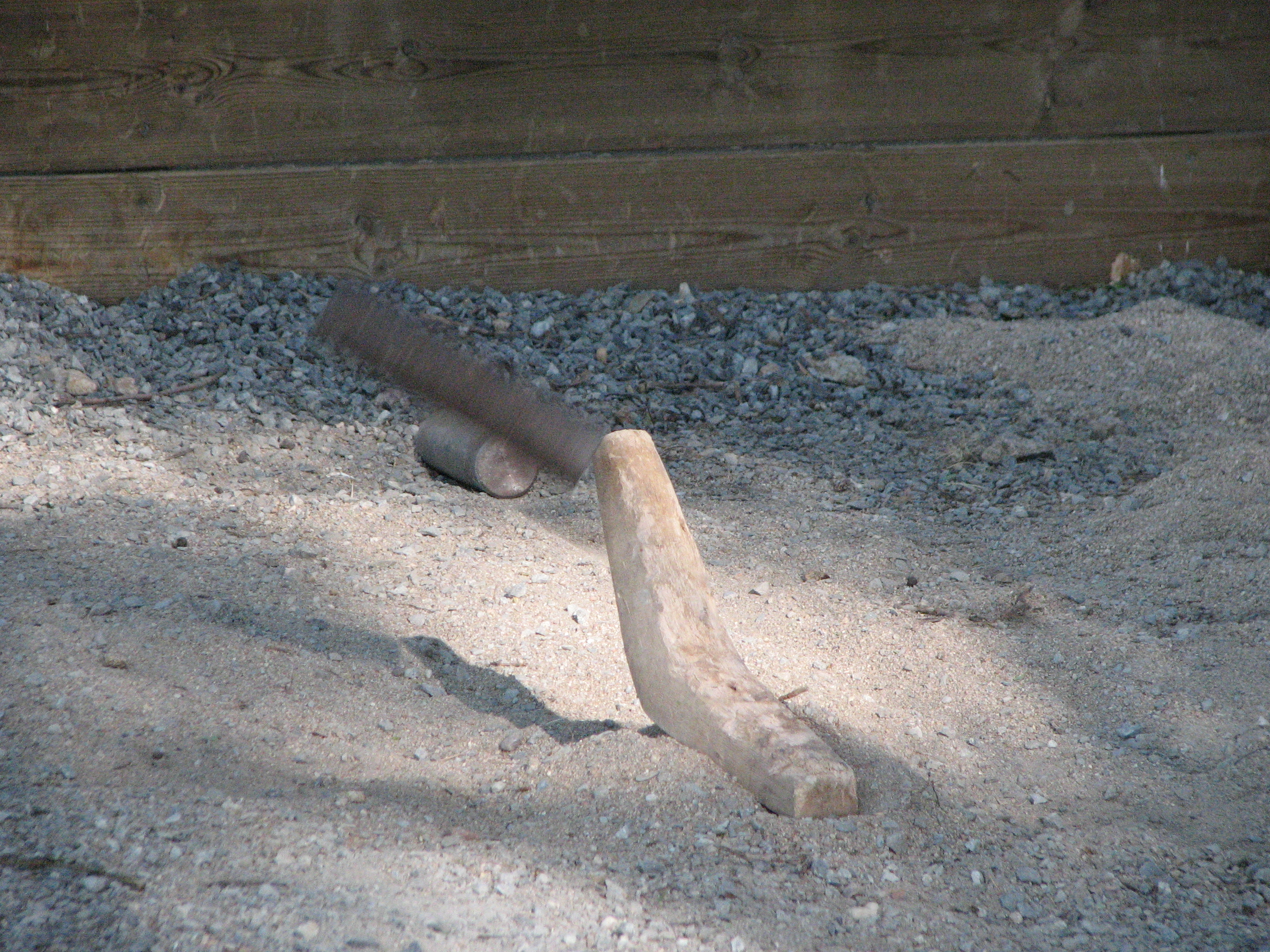 Calva y murillo o morrillo en vuelo. Juego de la calva. Juego tradicional español.